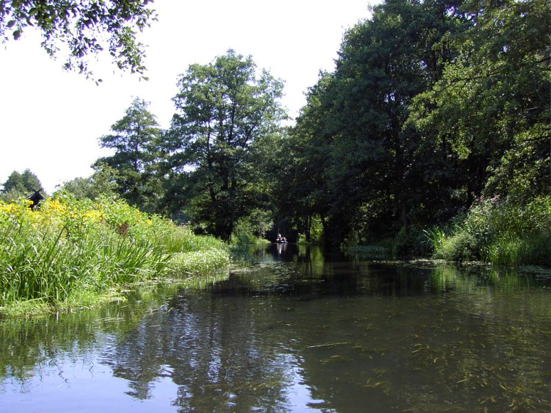 Der Spreewald